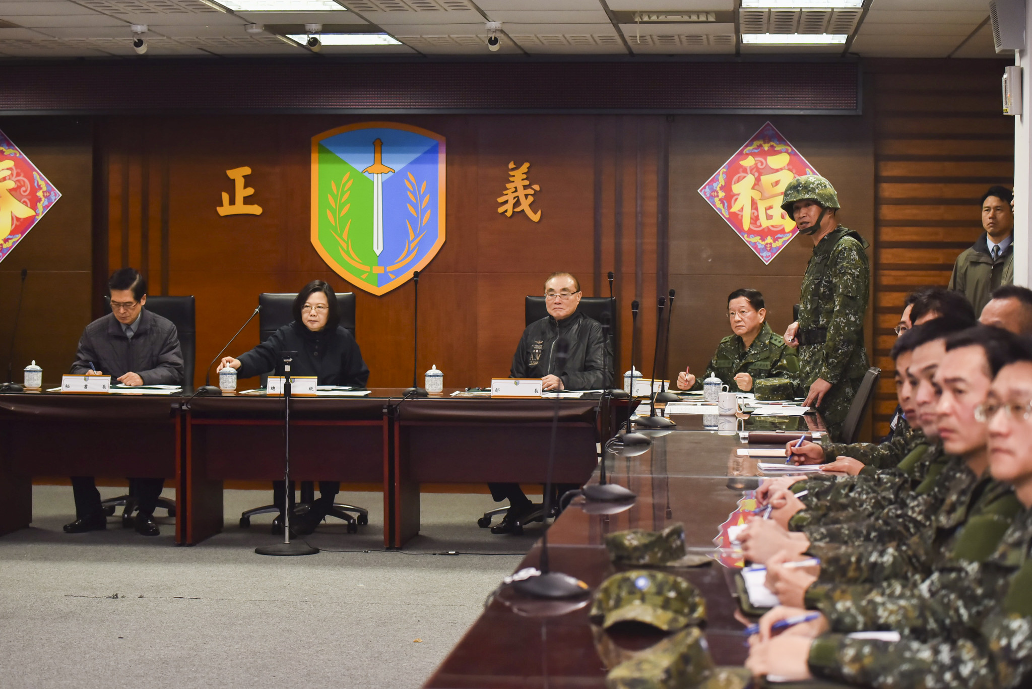 中華民國總統蔡英文2018年2月7日勘查花蓮震災情況時，聽取該國陸軍花東防衛指揮部的災情狀況簡報。